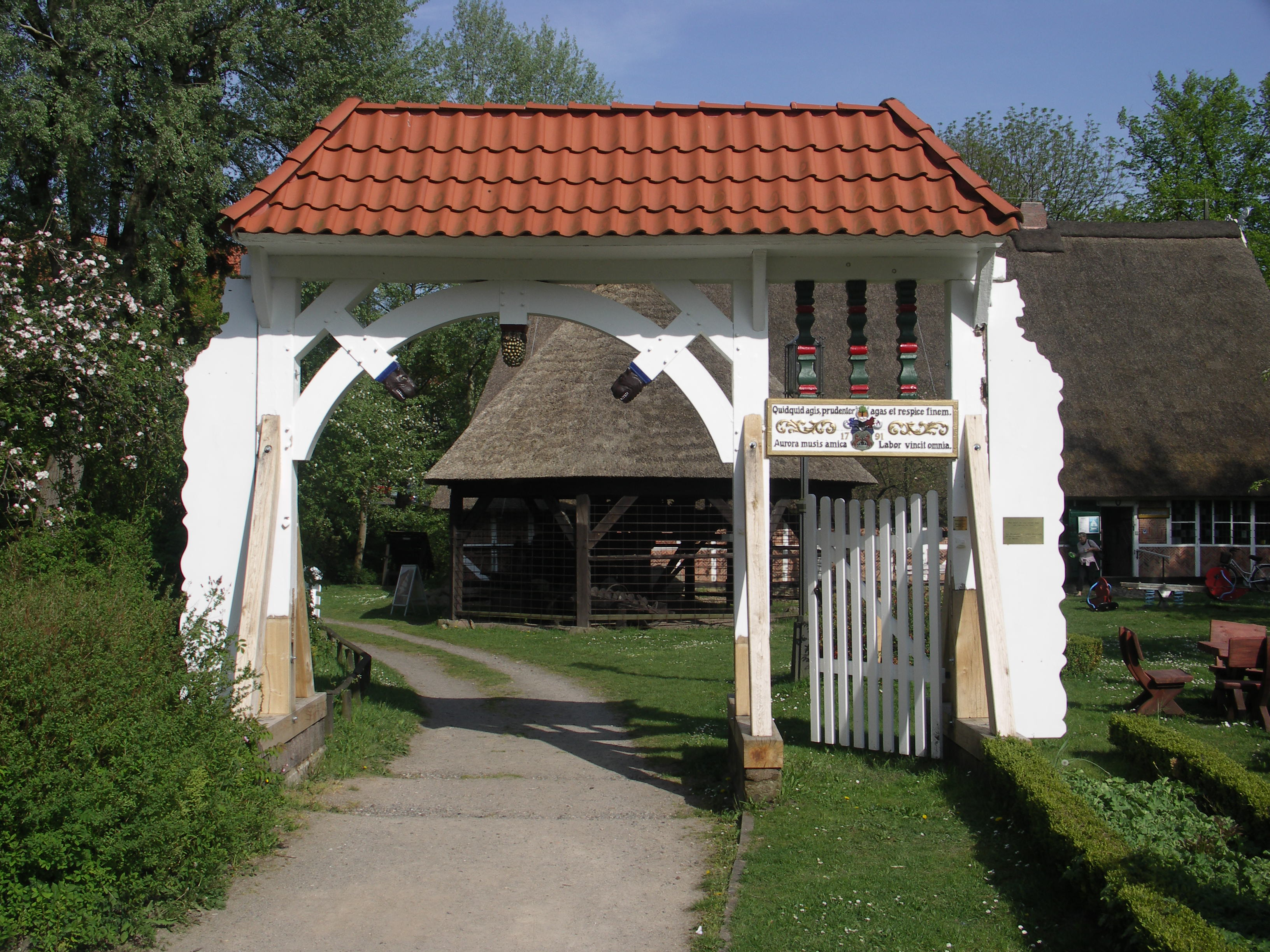 Altländer Pforte im Freilichtmuseum auf der Insel in Stade